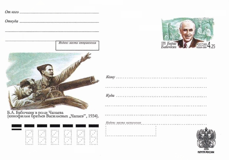 Конверт к 100-летию Бориса БабочкинаКонверт к 100-летию актёраи режиссёра Бориса Бабочкина